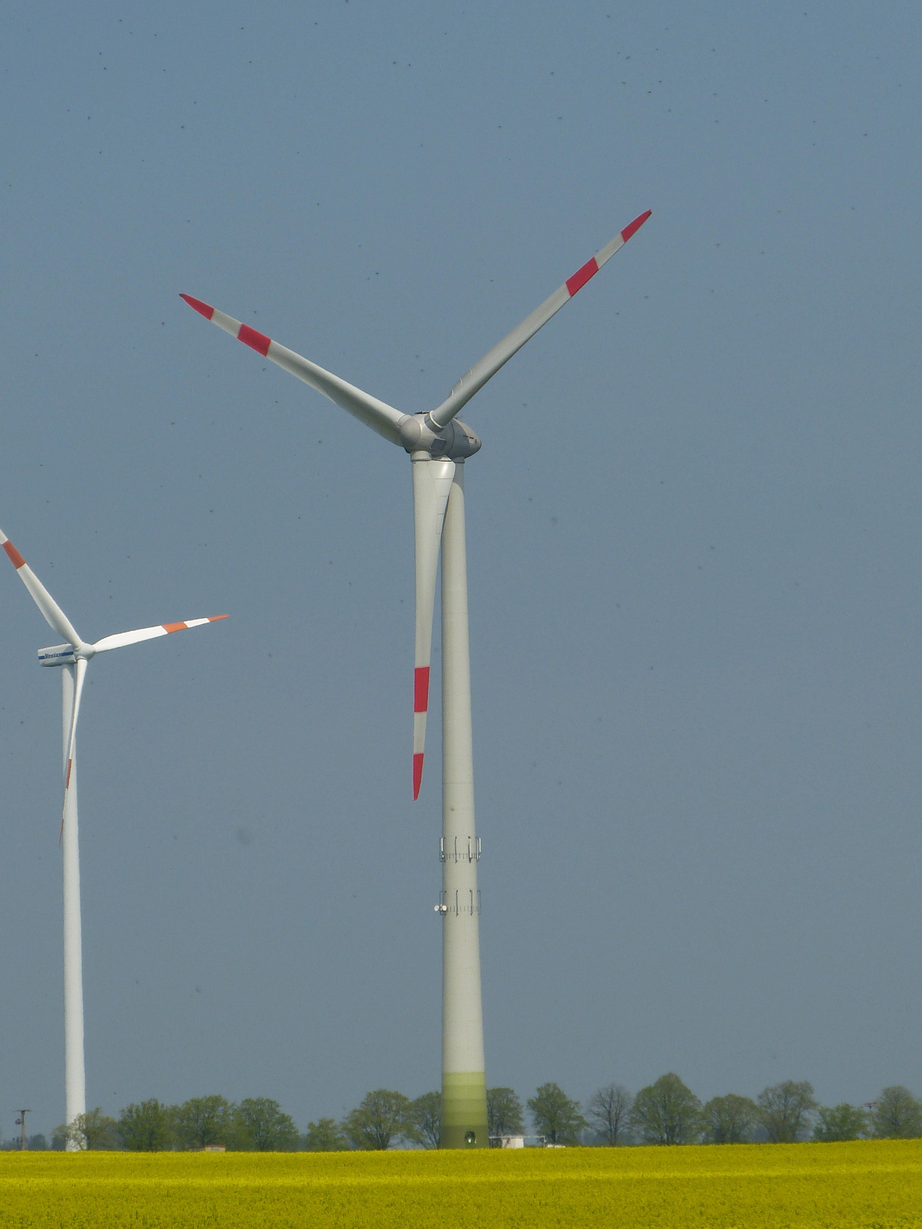 Görmin, Enercon E-101 bei Göslow